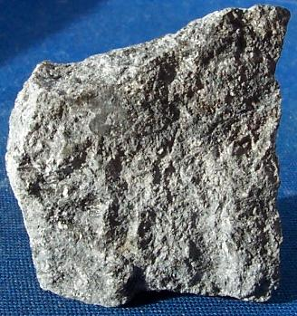 ludwigit, pochodzenie Włochy, autor zdjęcia Sebastian Socha 11.10. 2006 r.